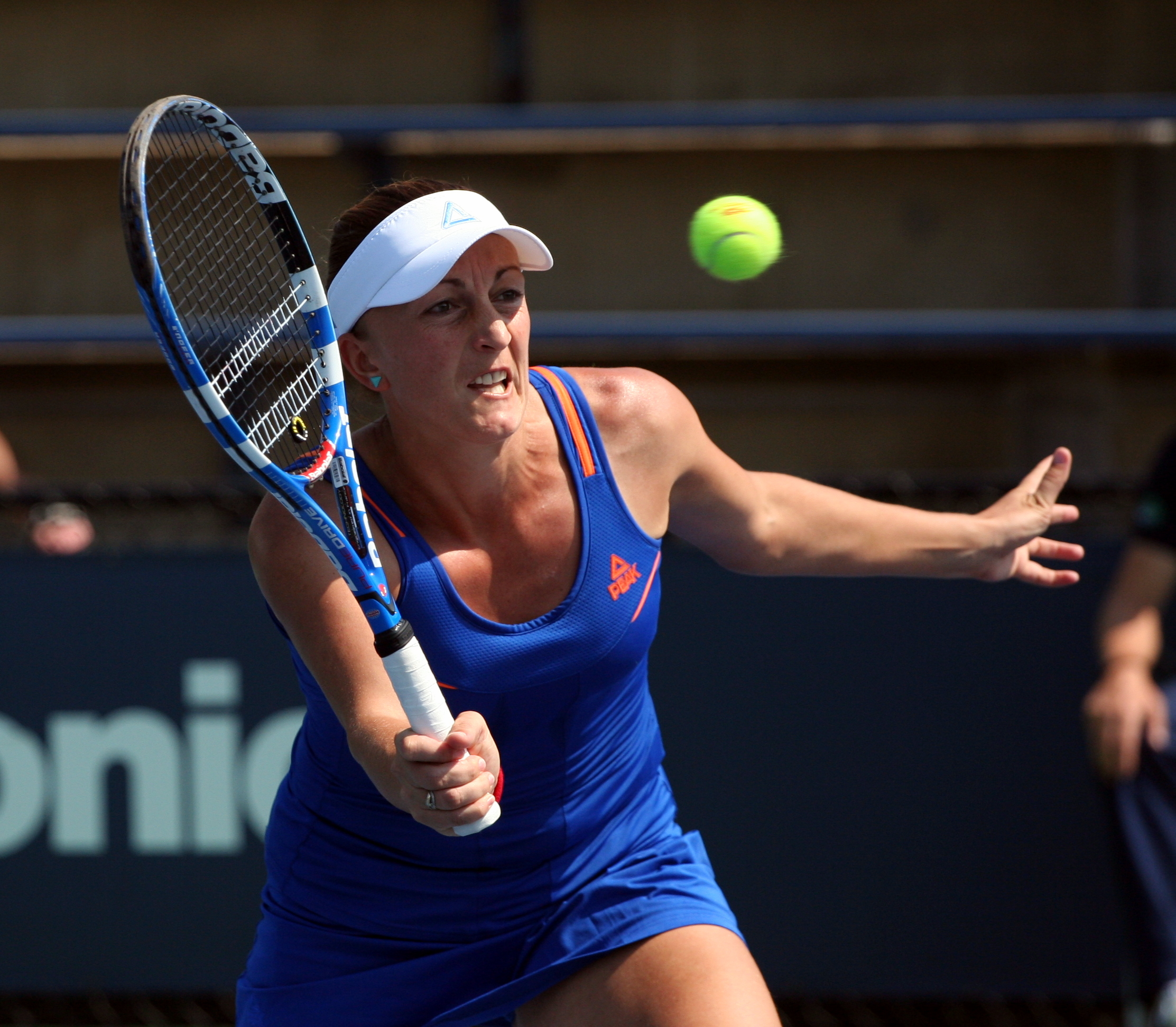 U.S. Open Saturday, Sept. 1, 2012